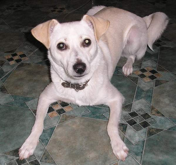 Dog